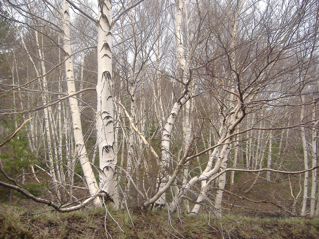 Betula pendula (syn. Betula aetnensis)